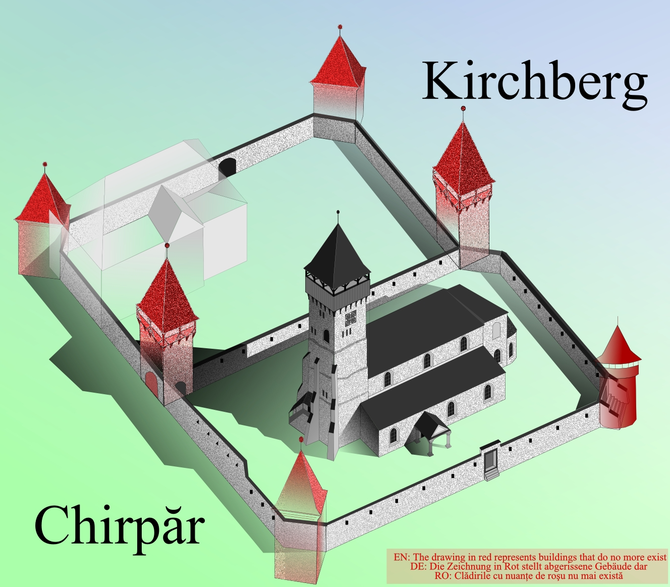 Biserica fortificata din Chirpar